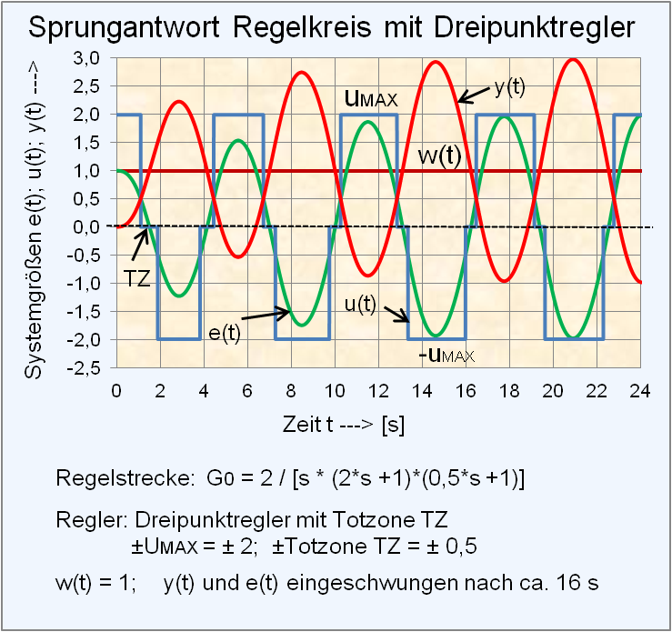 Sprungantwort eines Regelkreises mit PID-Regler im Zustand der Harmonischen Balance